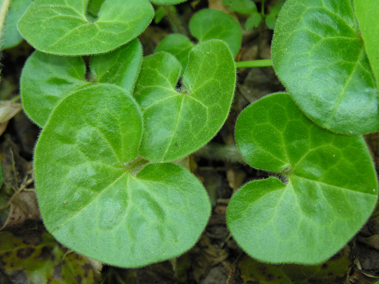 Europinės pipirlapės (Asarum europaeum) lapai Šeima. Kartuoliniai (Aristolochiaceae) Fotografavo: User:Algirdas, 2006 m. gegužės 13 d., Lietuva.